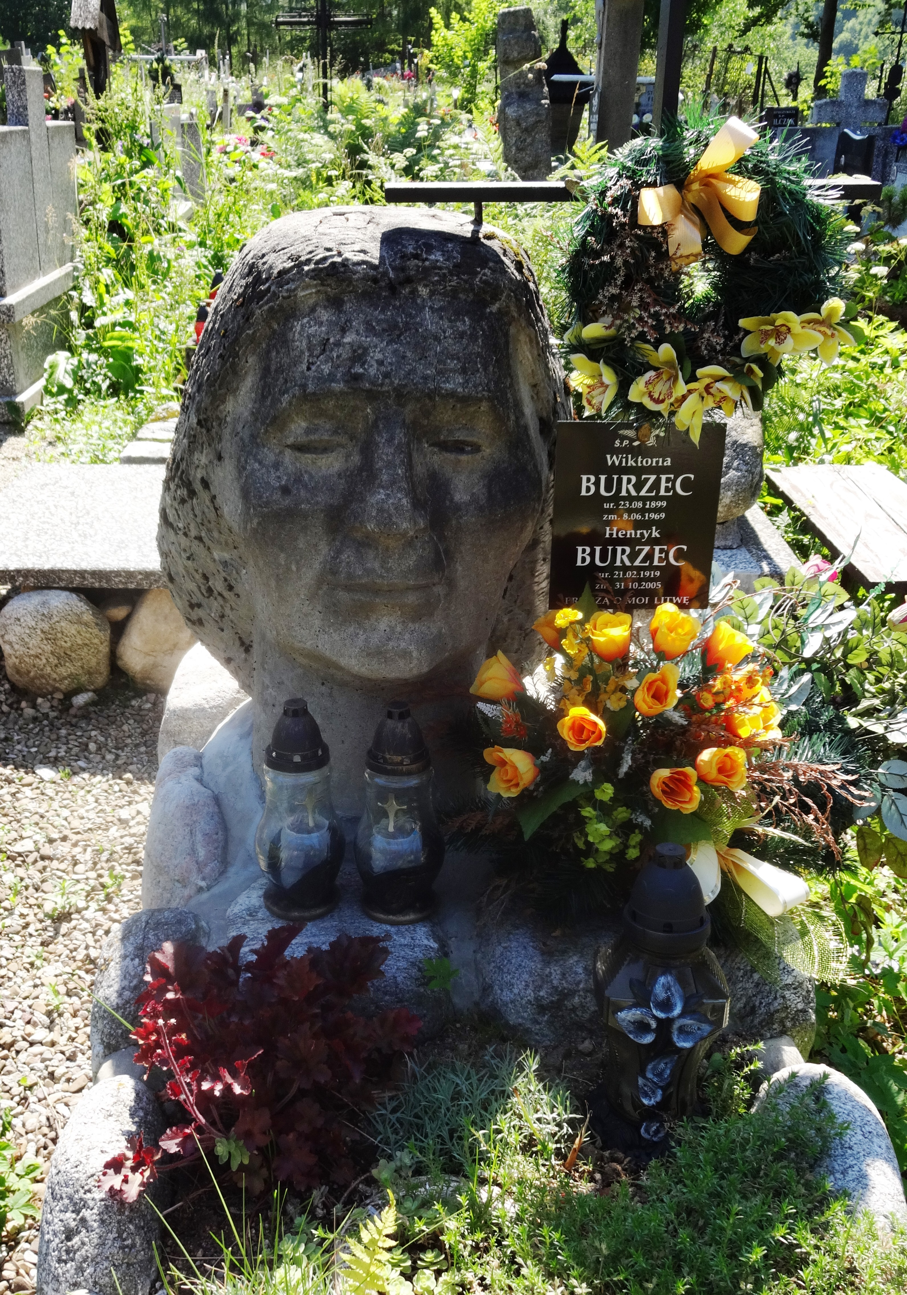 New Cemetery in Zakopane